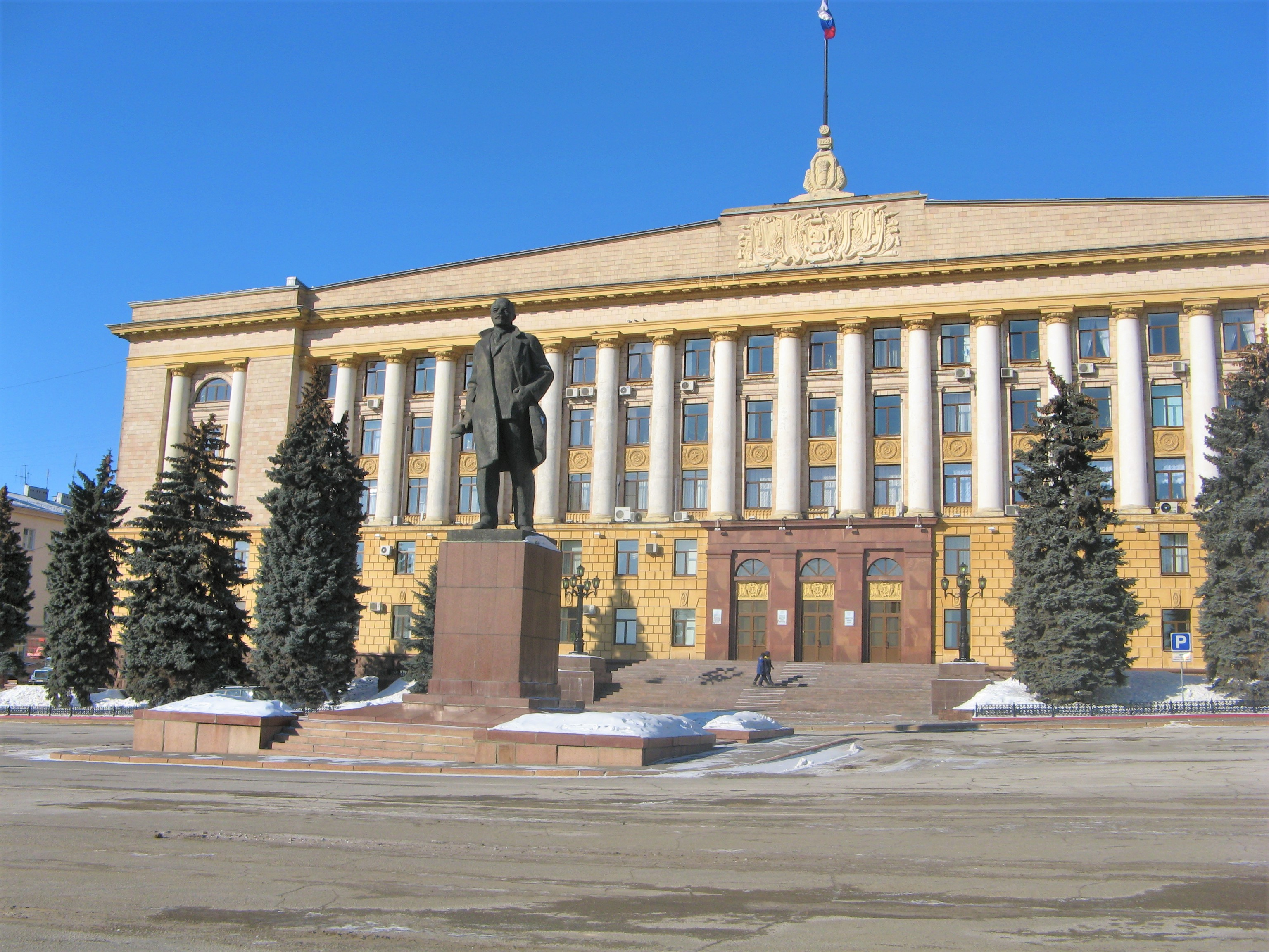 Липецкая областная администрация